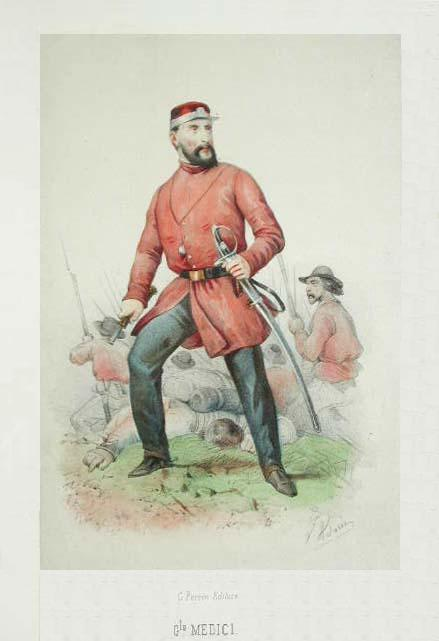 Generale Medici (1861).